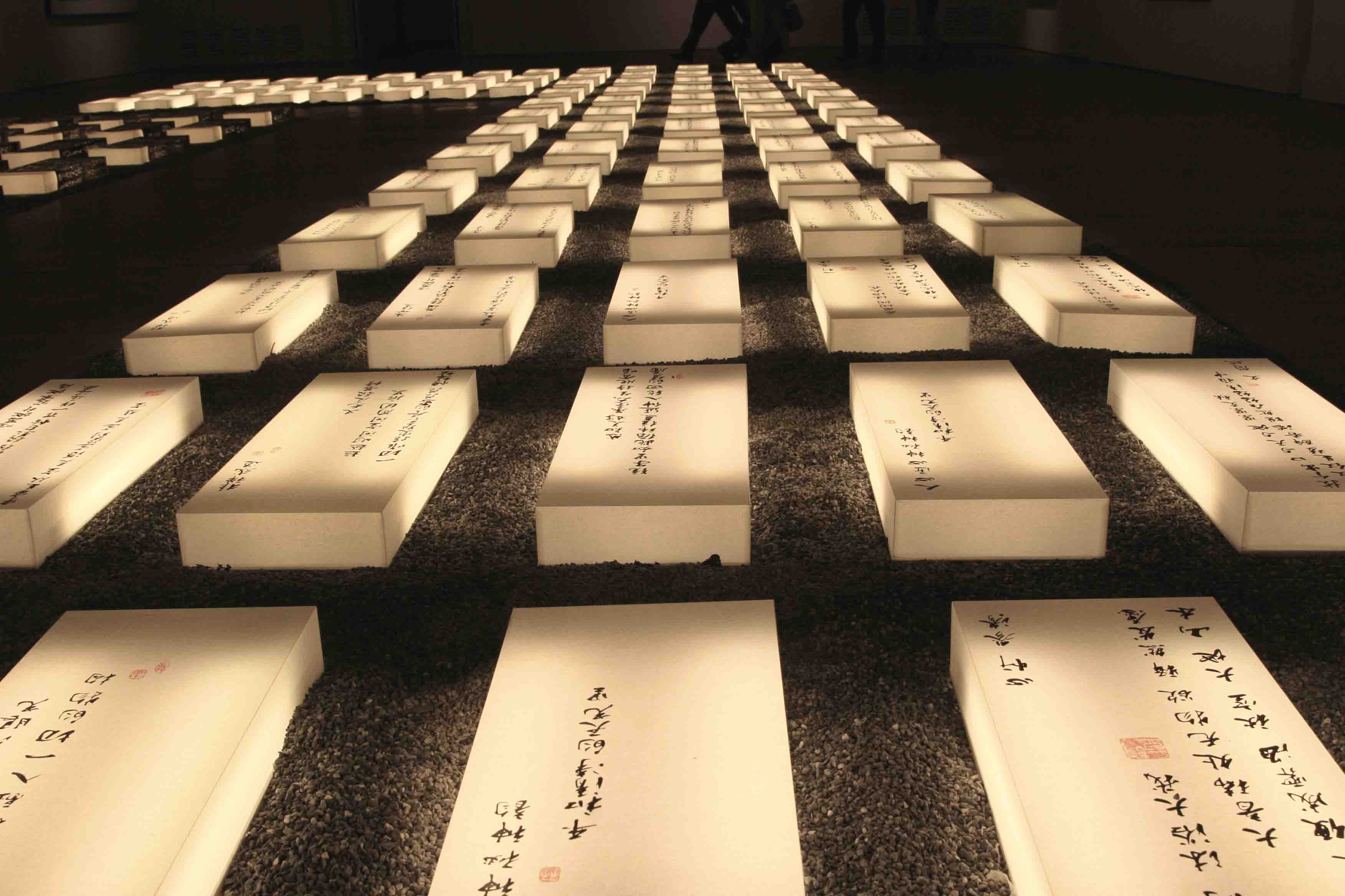 Les Stèle de Lumière de Li Chevalier